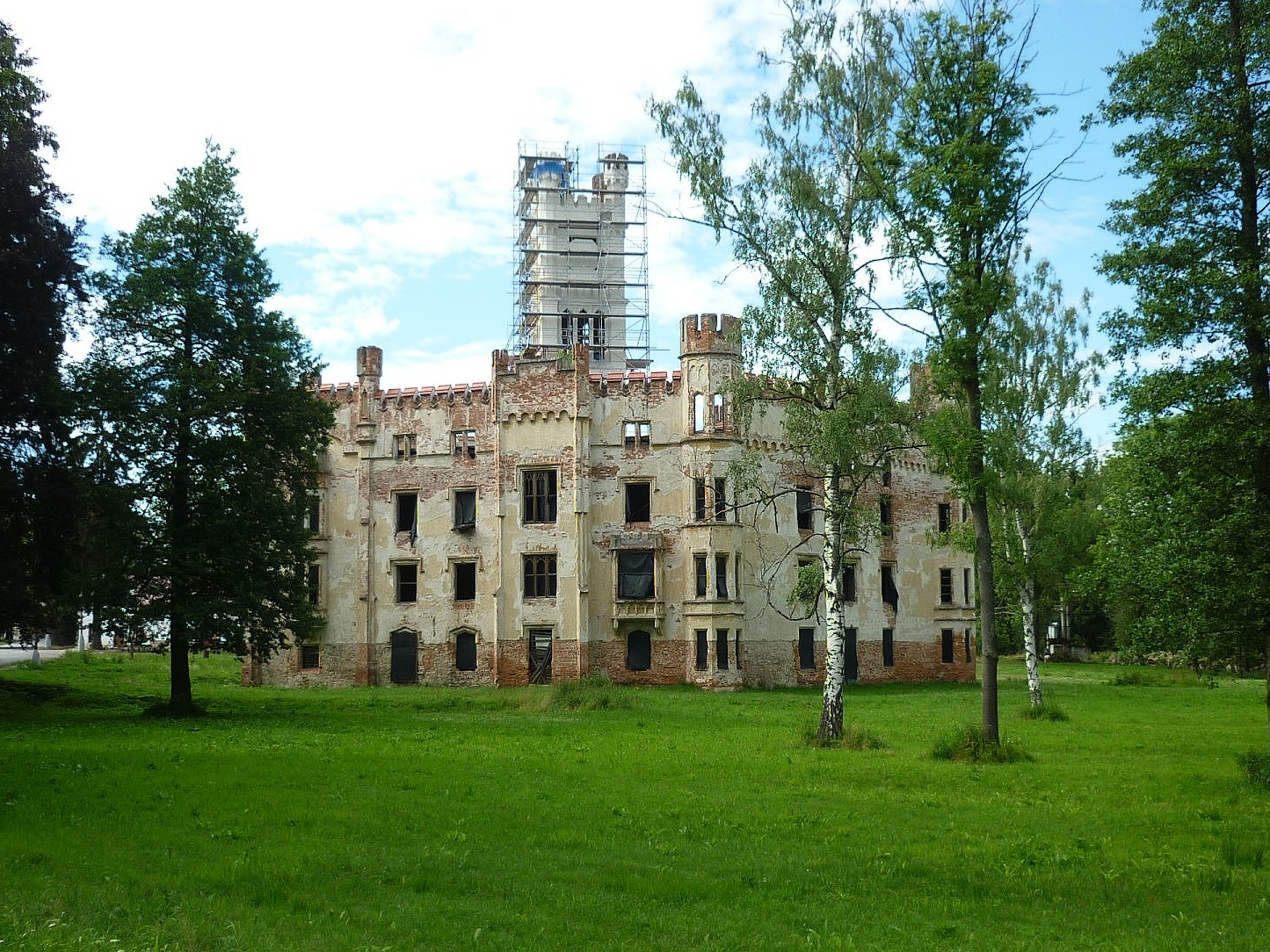 Zámek v Českém Rudolci - oprava v roce 2015